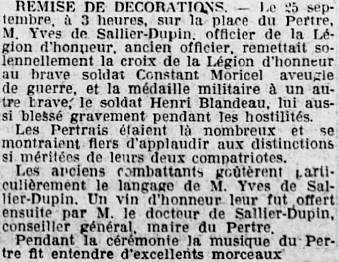 Remises de décorations à deux soldats du Pertre en 1921 (journal L'Ouest-Éclair du 30 septembre 1921).